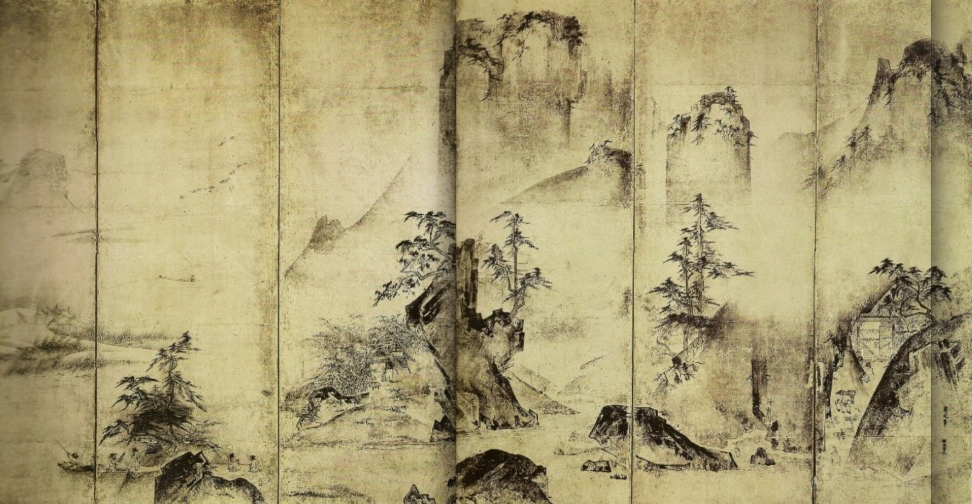 Paysage des quatre saisons (paravent 1 - de deux paravents jumeaux) (152x310 centimètres) est une encre sur papier peinte par le peintre japonais du XVe siècle, Tenshō Shūbun. Collection Maeda, Ikutokukai, Tokyo.